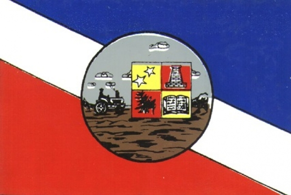 A bandeira do município de Quatro Pontes, aprovado pela Lei Municipal nº 036/93, de 10 de setembro de 1993.